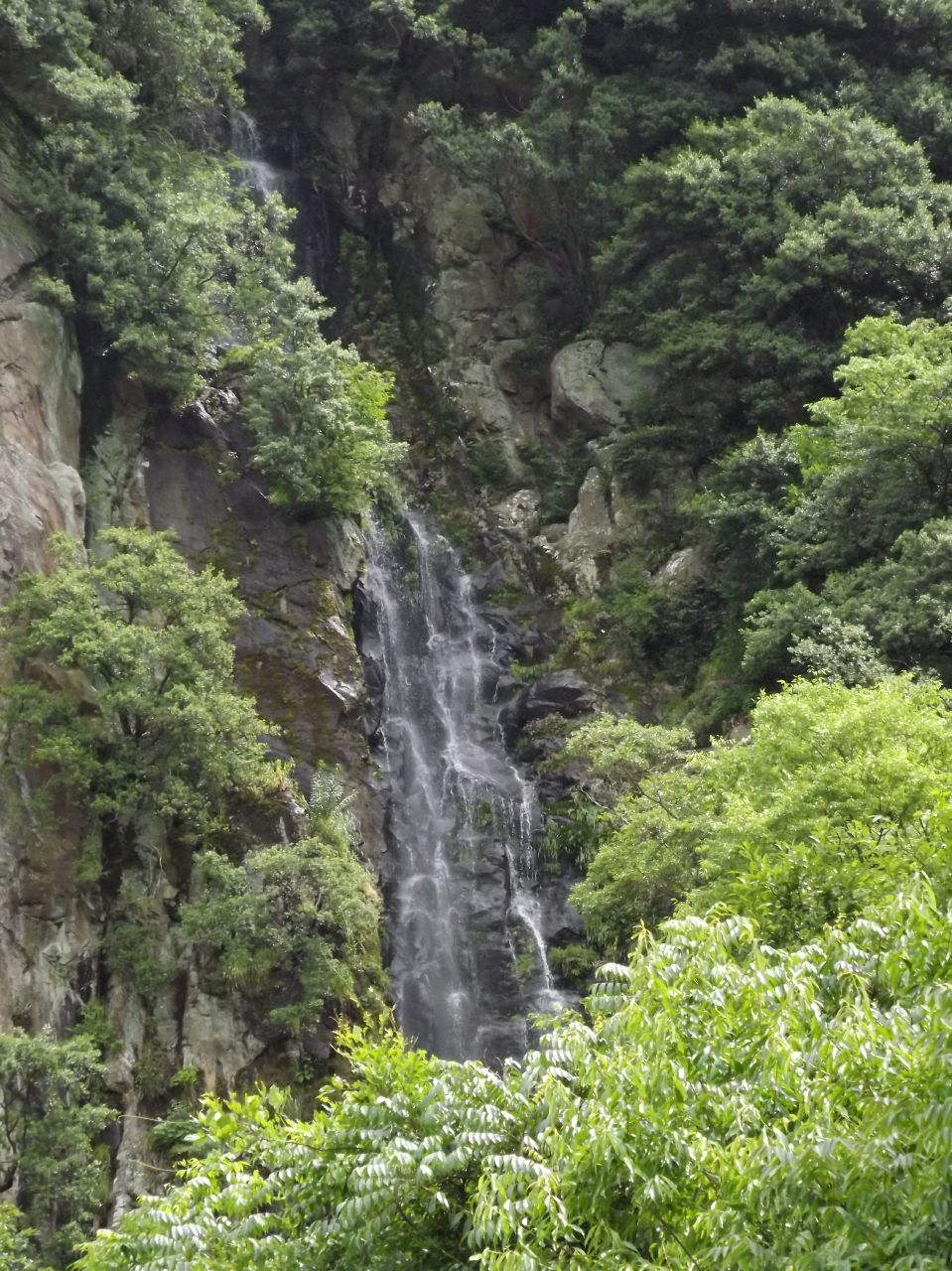 白峰山 稚児の滝